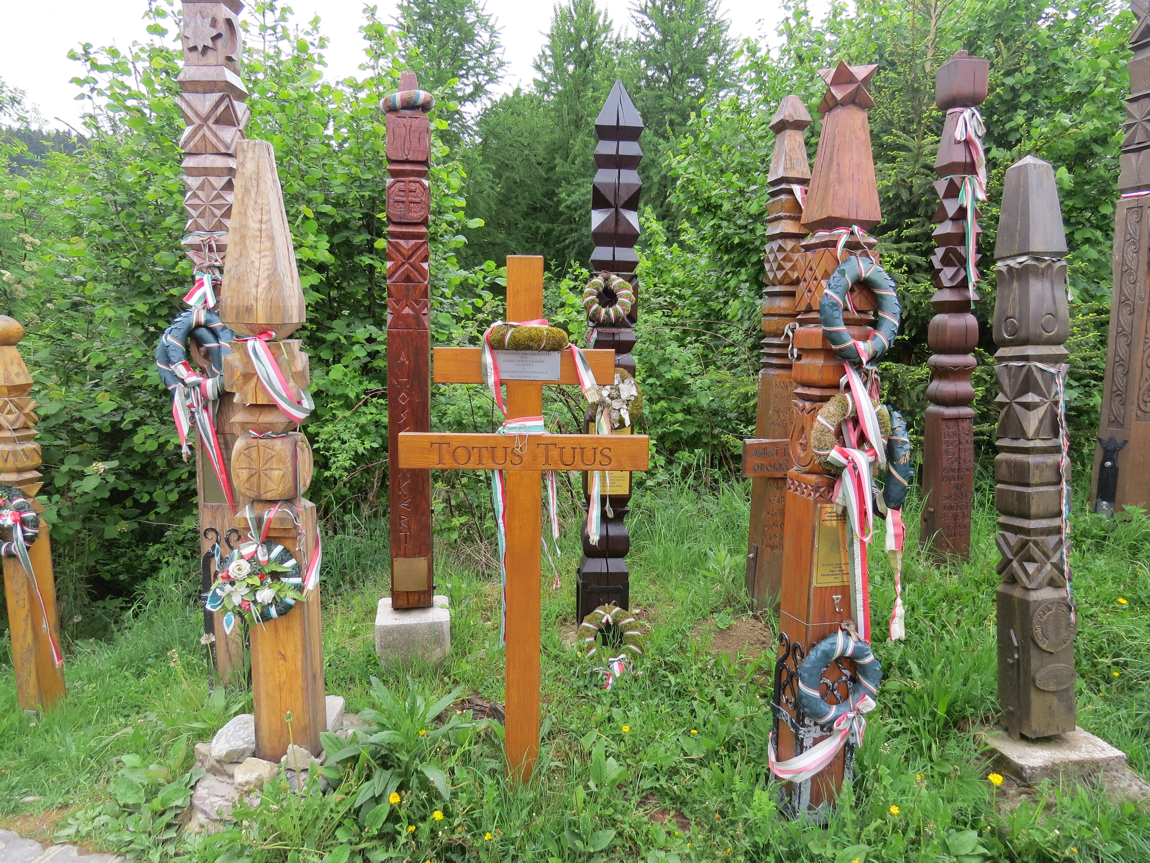 Nyerges-tető, az 1848–49-es forradalom és szabadságharc egyik utolsó székelyföldi csatájának színhelye. Az erdő szélén lévő területen, egy tömegsírba hantolták el akkor az ütközet áldozatait, akiknek emlékét többek közt számtalan kopjafa őrzi.